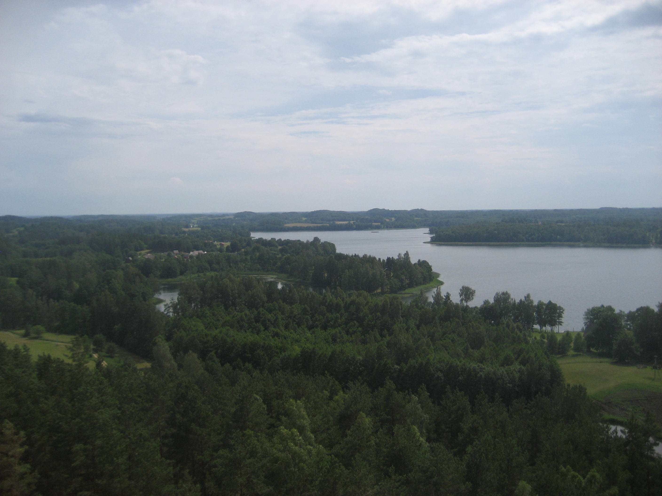 Nationalpark Aukštaitija: Blick vom Aussichtsturm bei Ginučiai